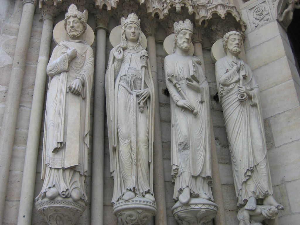 Cathédrale Notre-Dame de Paris: portail de droite